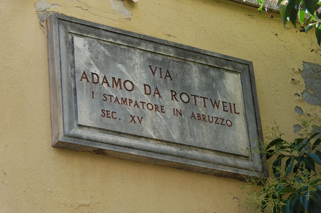 L'Aquila 2011